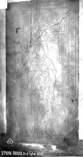 Pierre tombale.